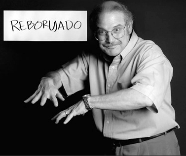 Reborujando: "Cuando la dices delante de gente que no es de aquí no entiende, parece muy obvio, porque la palabra da la idea de la acción" (Francisco Amparán - Torreón, Coahuila, 1957), en una entrevista para un artículo de Siglo Nuevo, suplemento de El Siglo de Torreón, año 1, #4